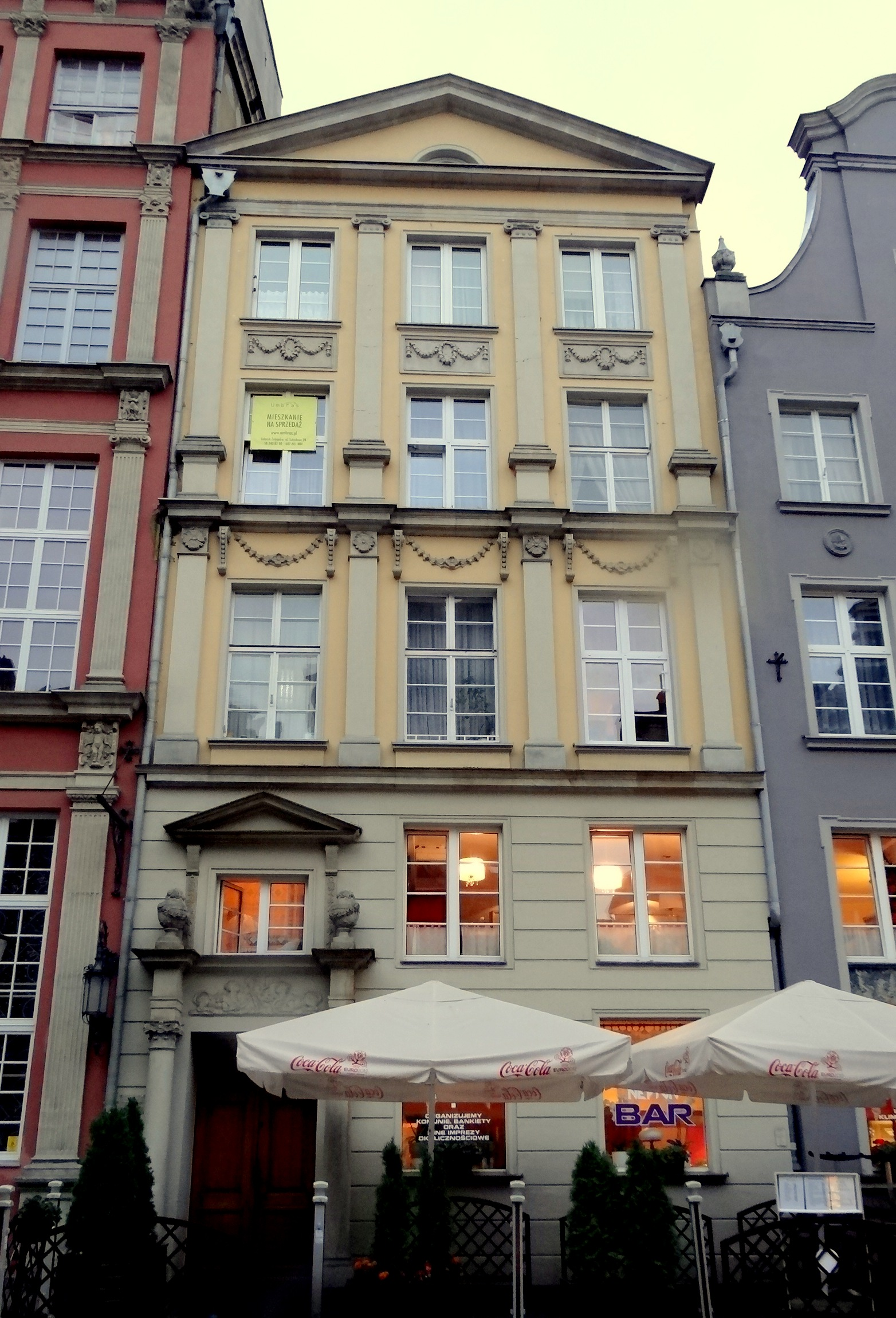 kamienica ul. Długa 34, Gdańsk